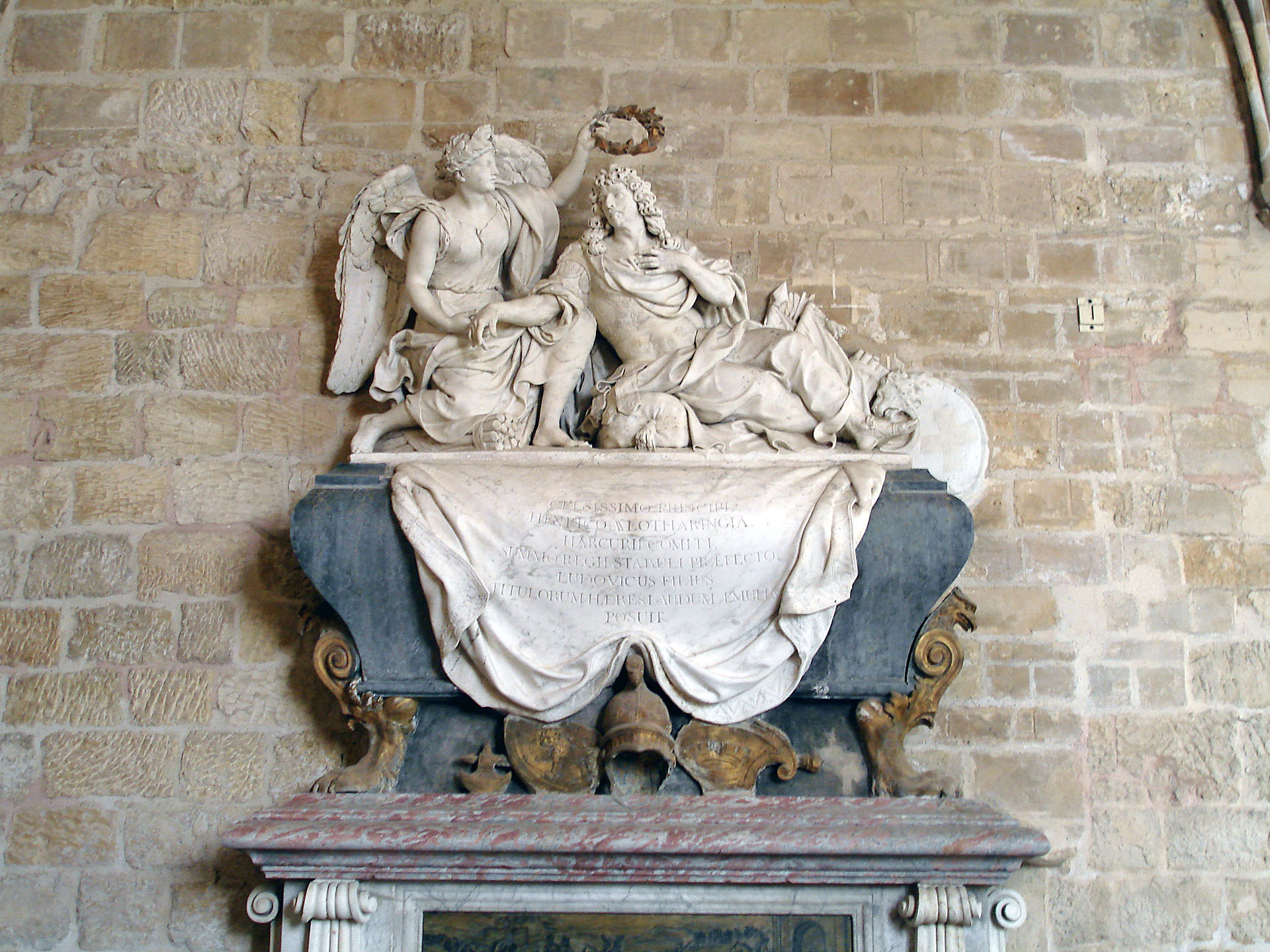 Le tombeau d'Henri de Lorraine-Harcourt dans le réfectoire des moines de l'abbaye de Royaumont, Val-d'Oise, France.